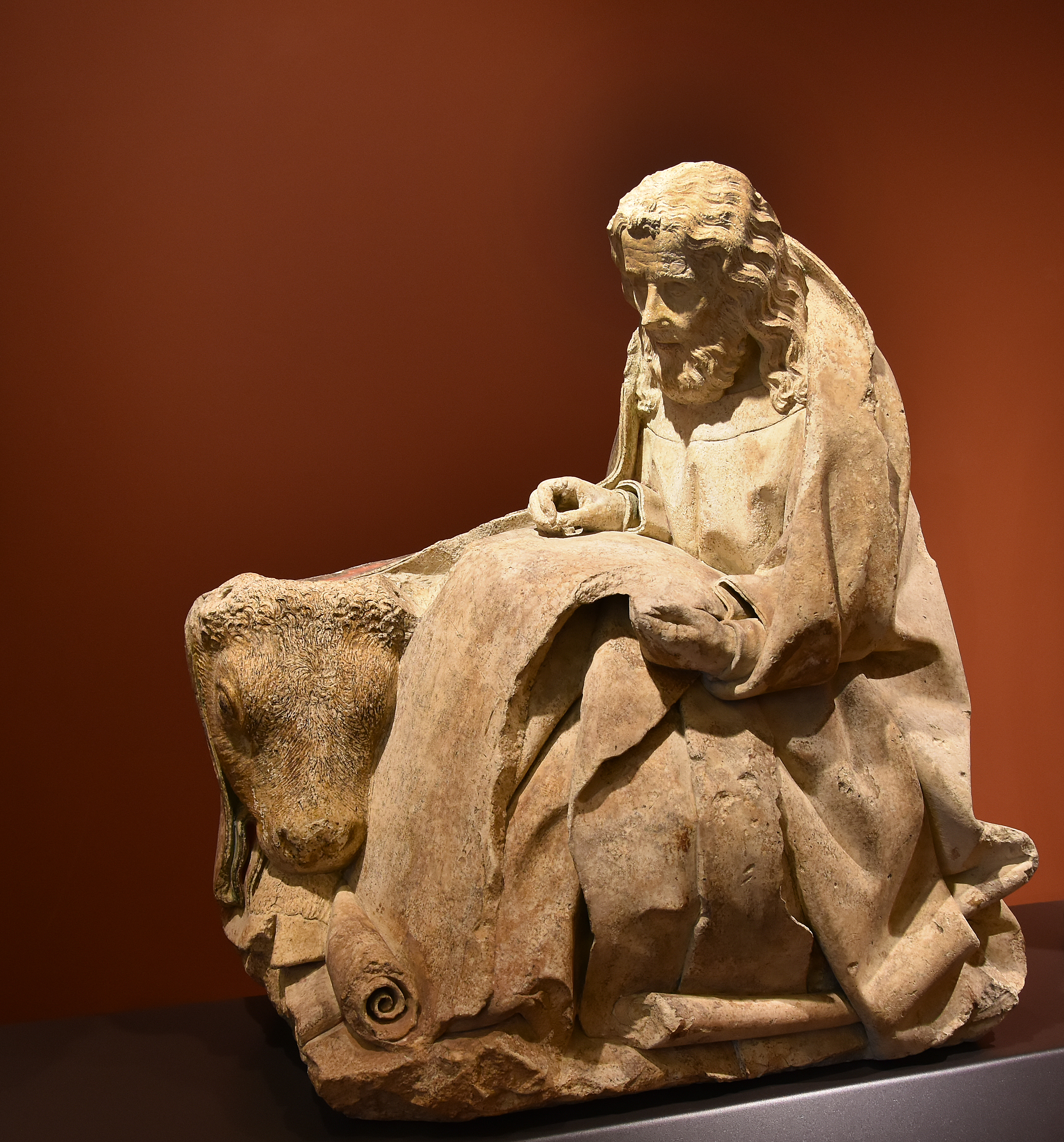 Bourgogne (rond 1450) Lucas schrijft het evangelie - Musée des Beaux-Arts de Dijon